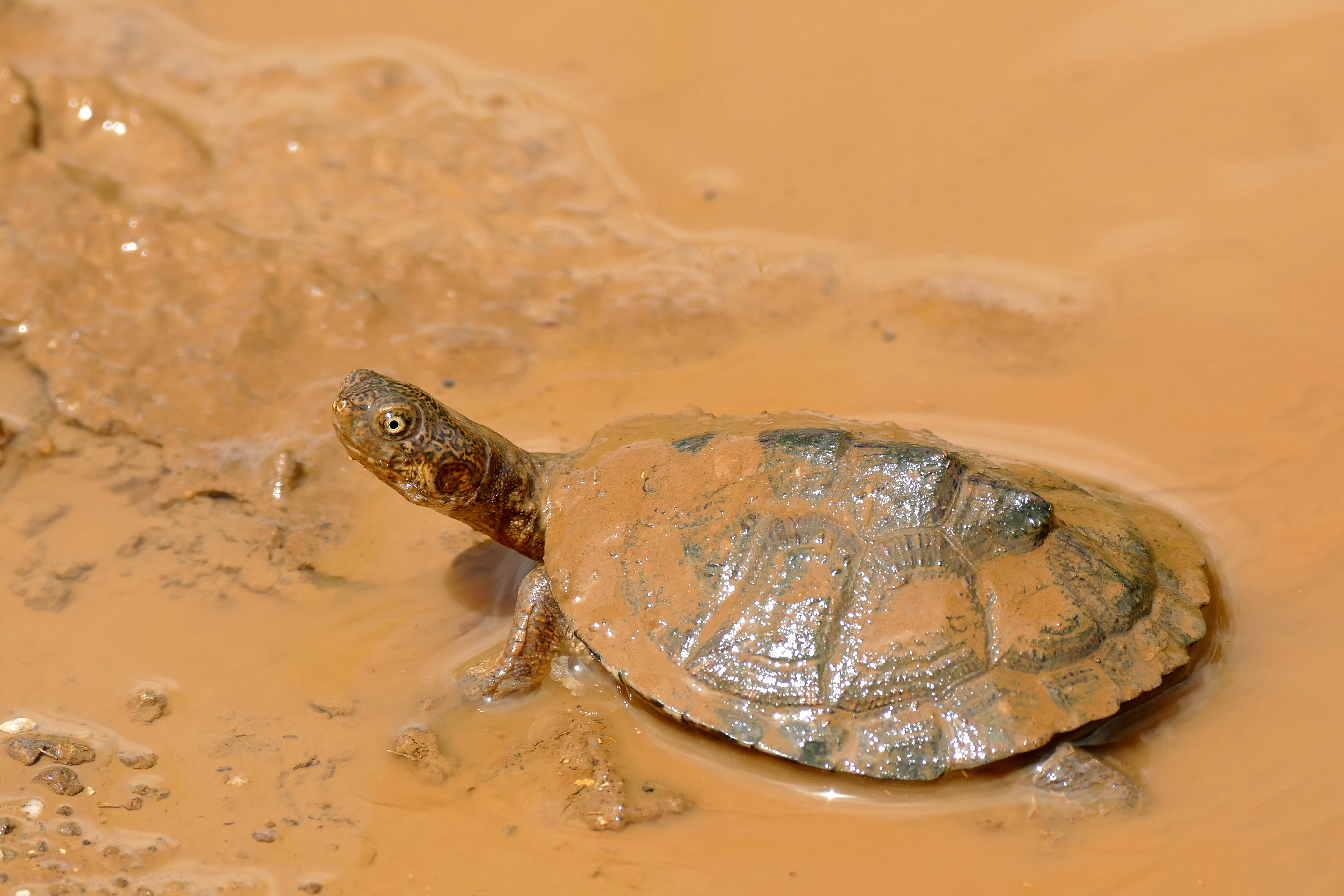 Sunset Dam, Lower Sabie, Kruger NP, SOUTH AFRICA